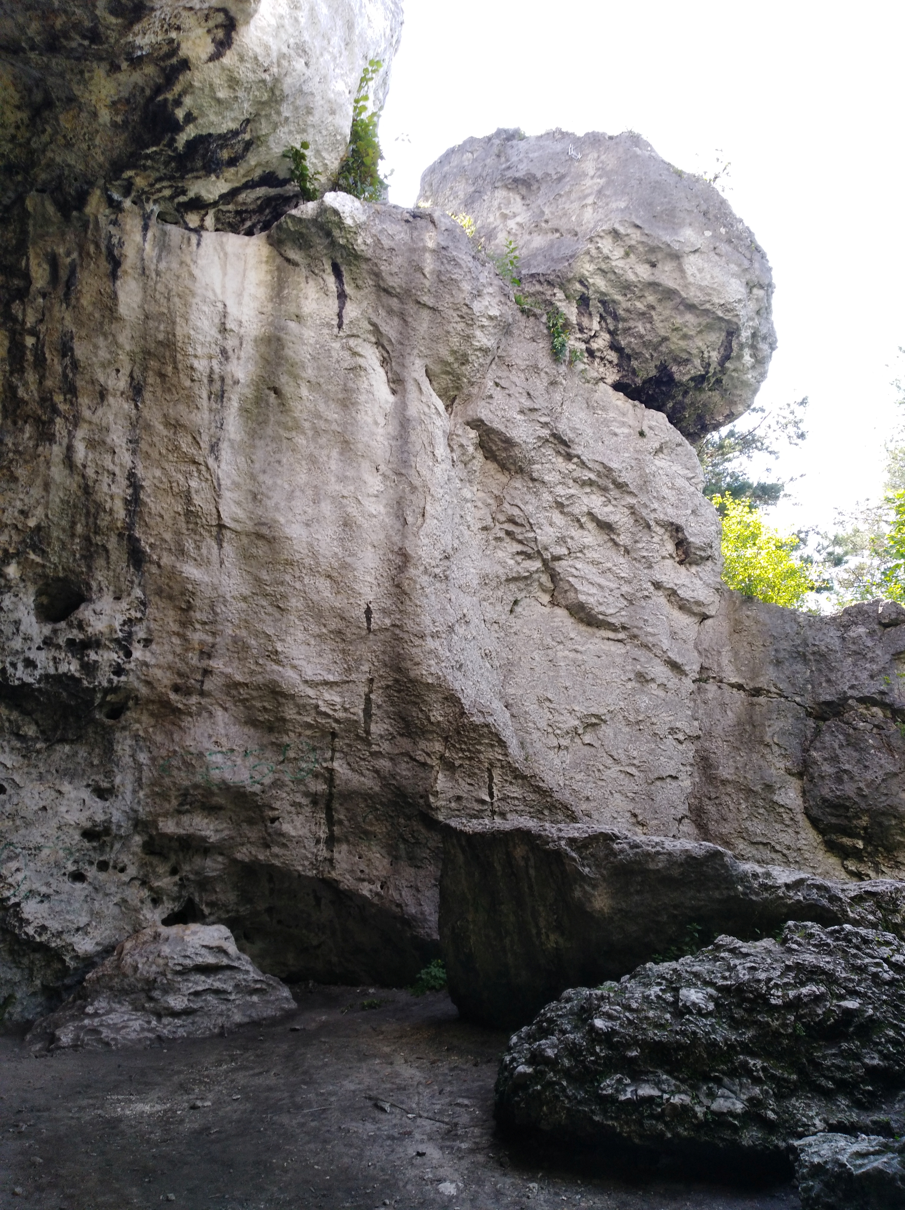 Skała Kazerma na wzgórzu Kołoczek w Podlesicach